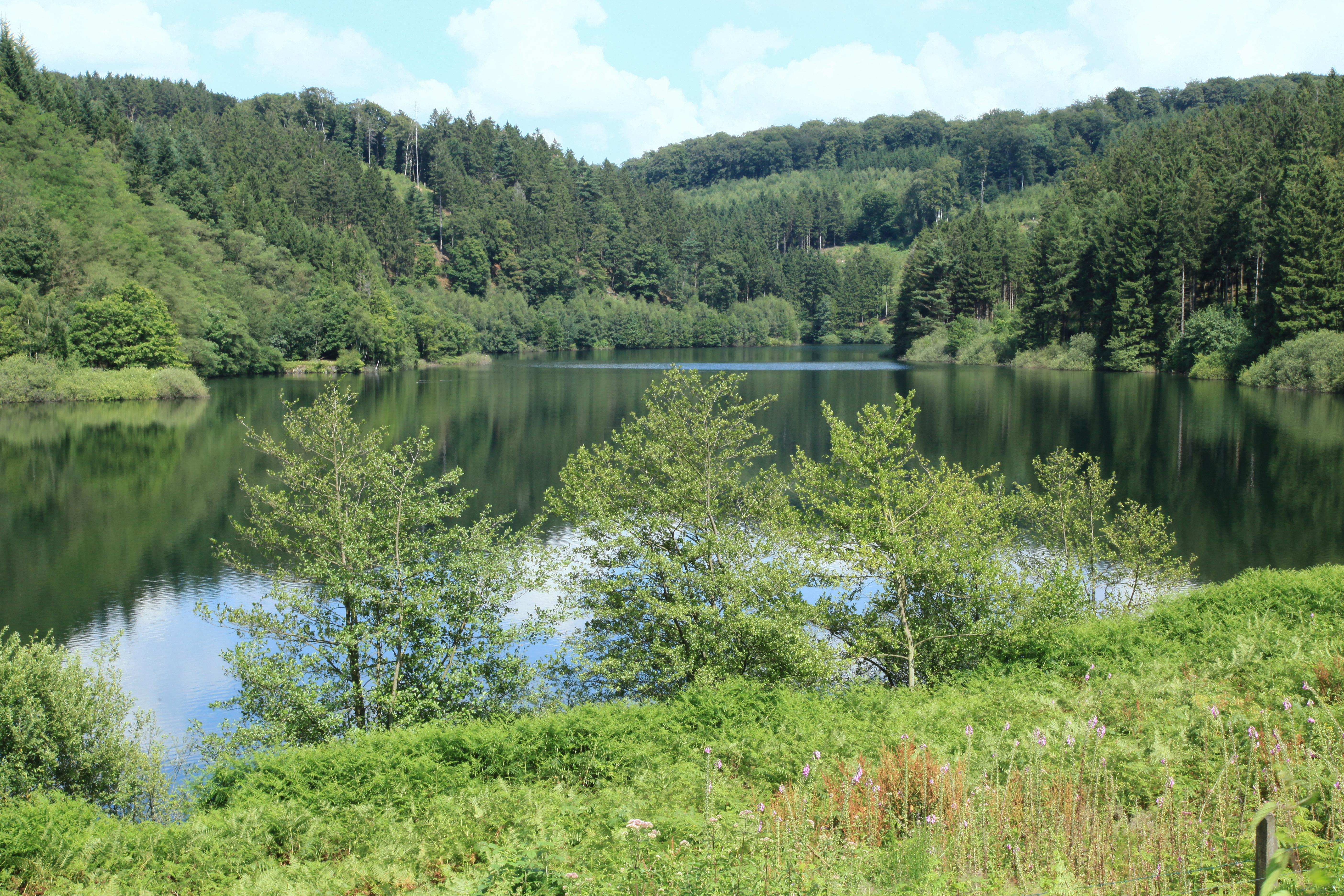 Hasper Talsperre, Talsperrenweg in Hagen